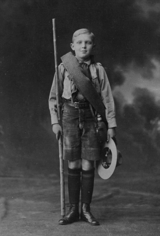 El Príncipe de Asturias, Alfonso de Borbón y Battenberg, en uniforme de los Exploradores de España hacia 1918.